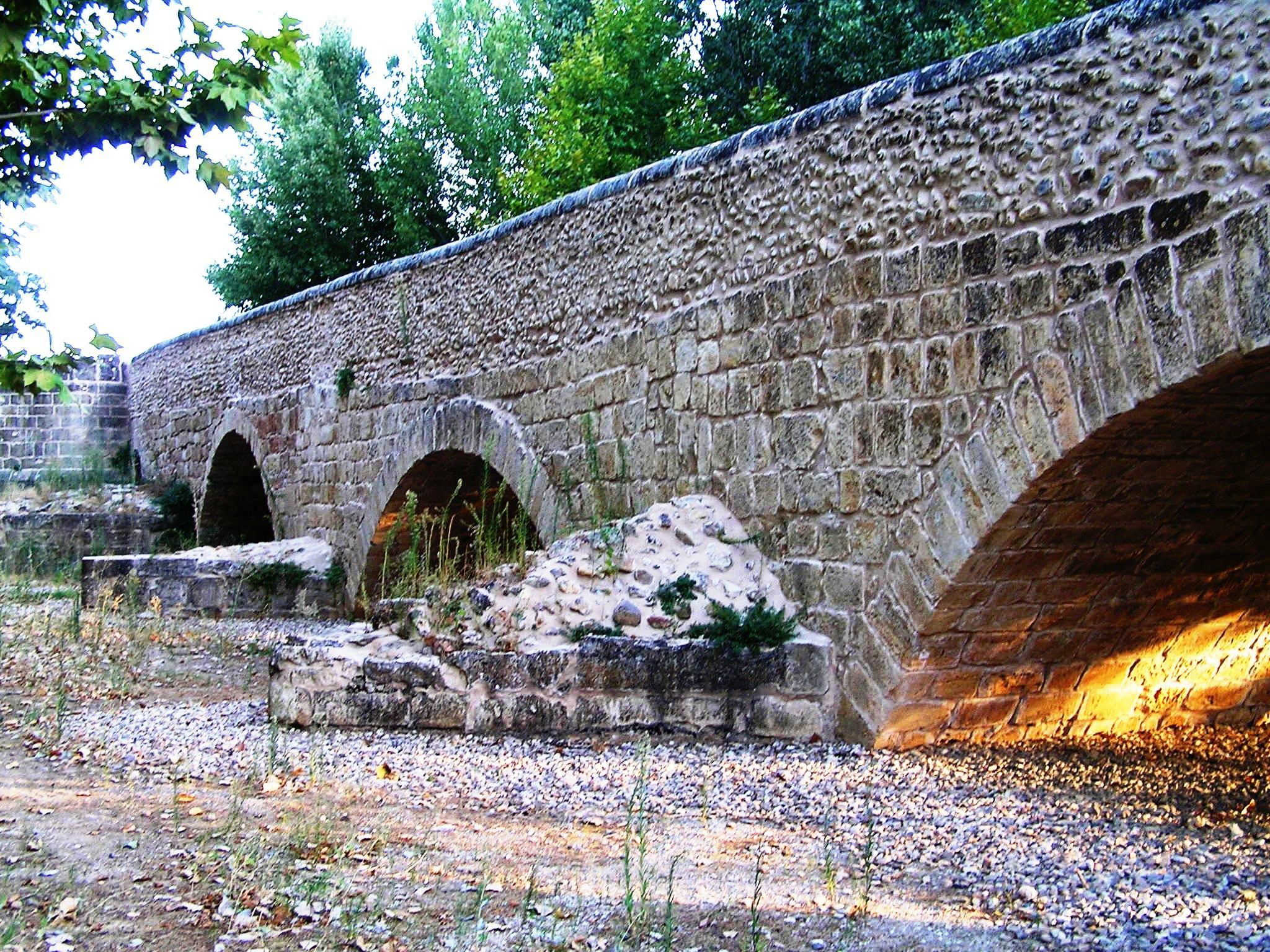 Puente romano sobre el arroyo del Caz